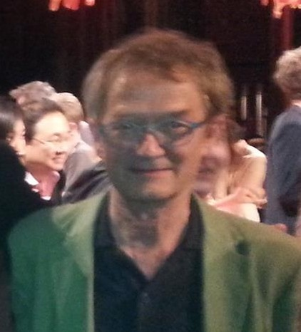 Georges Schwizgebel au festival international du film d'animation d'Annecy 2017